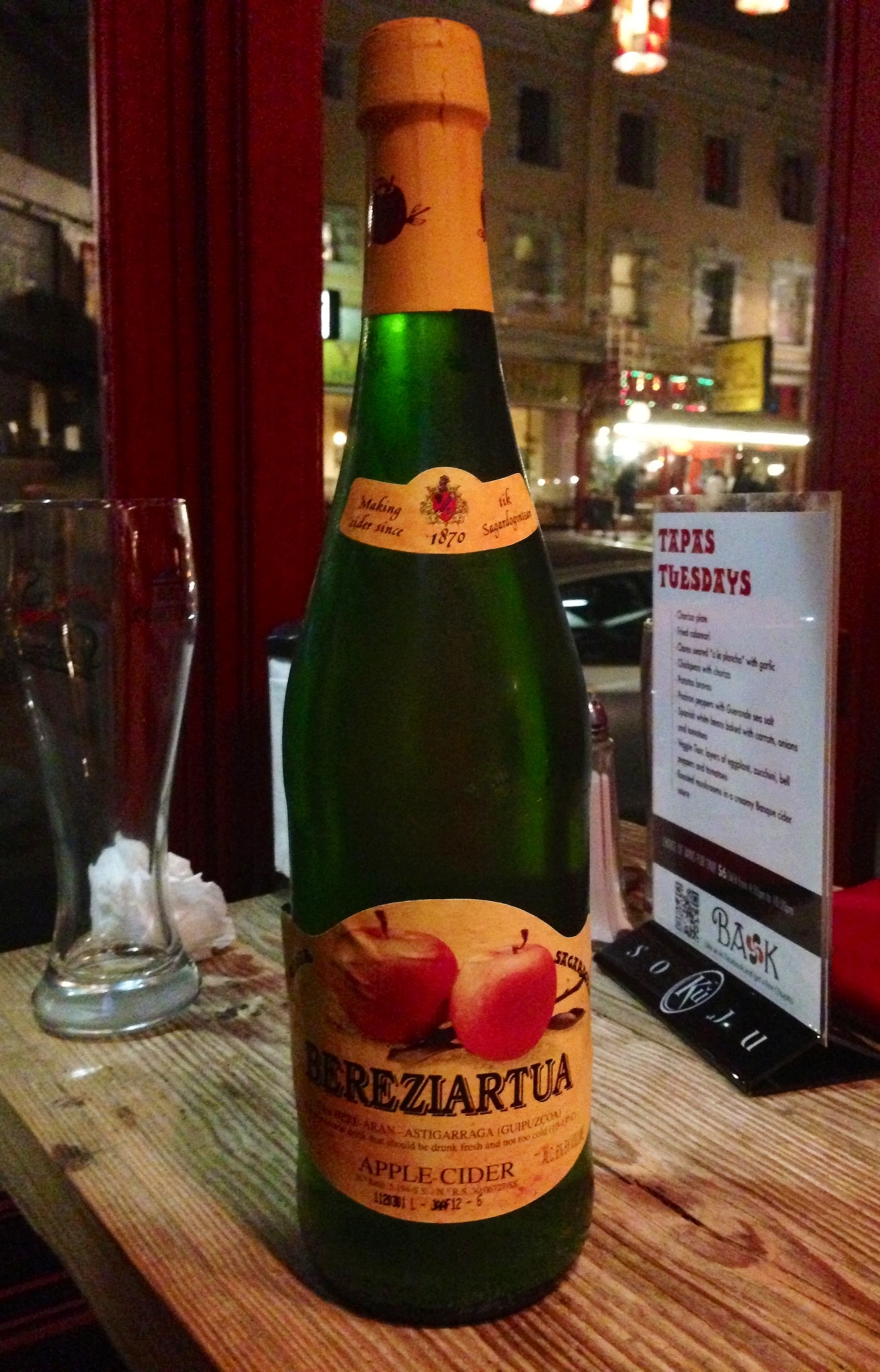 Basque cider